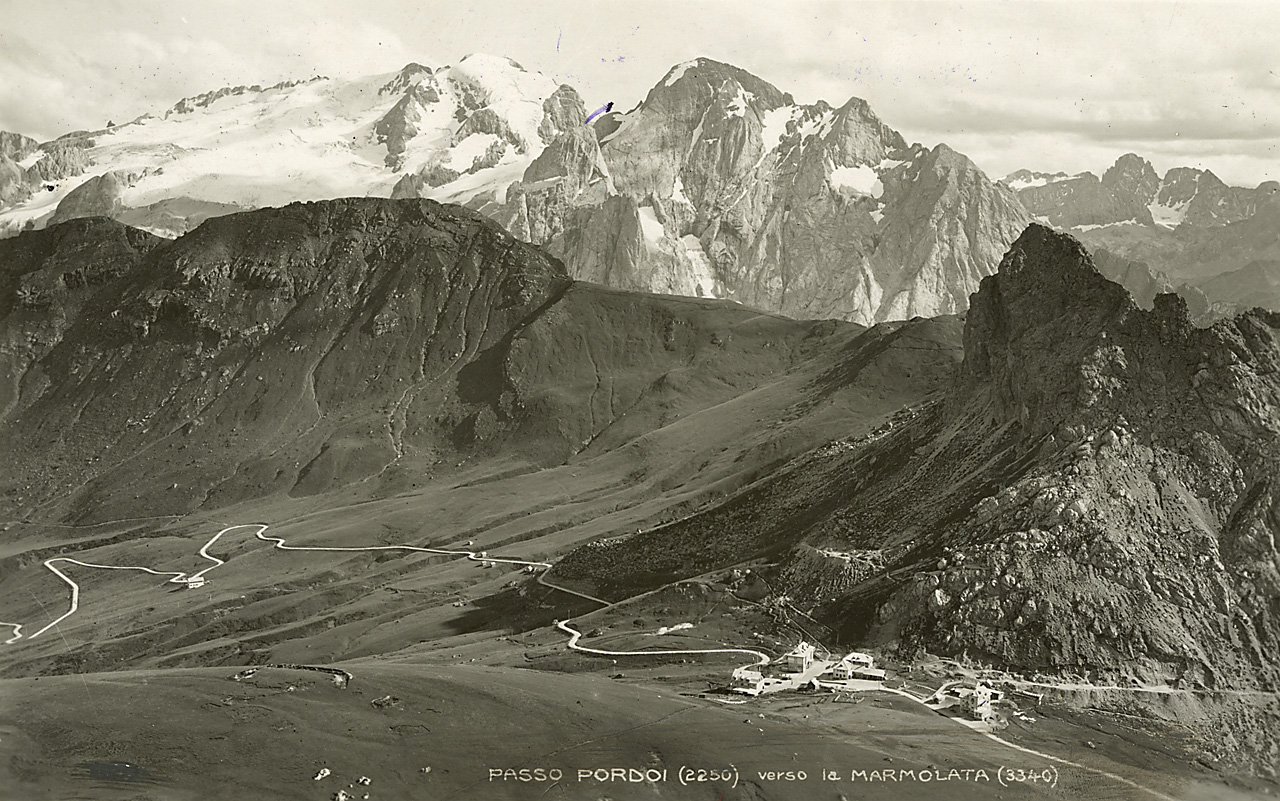 Passo Pordoi – Dolomiti